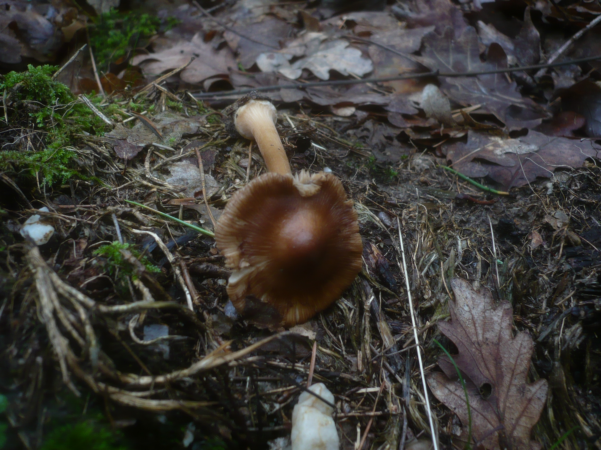 Inocybe asterospora. Gaberlingwald, Neutal, Bezirk Oberpullendorf, Burgenland, Austria